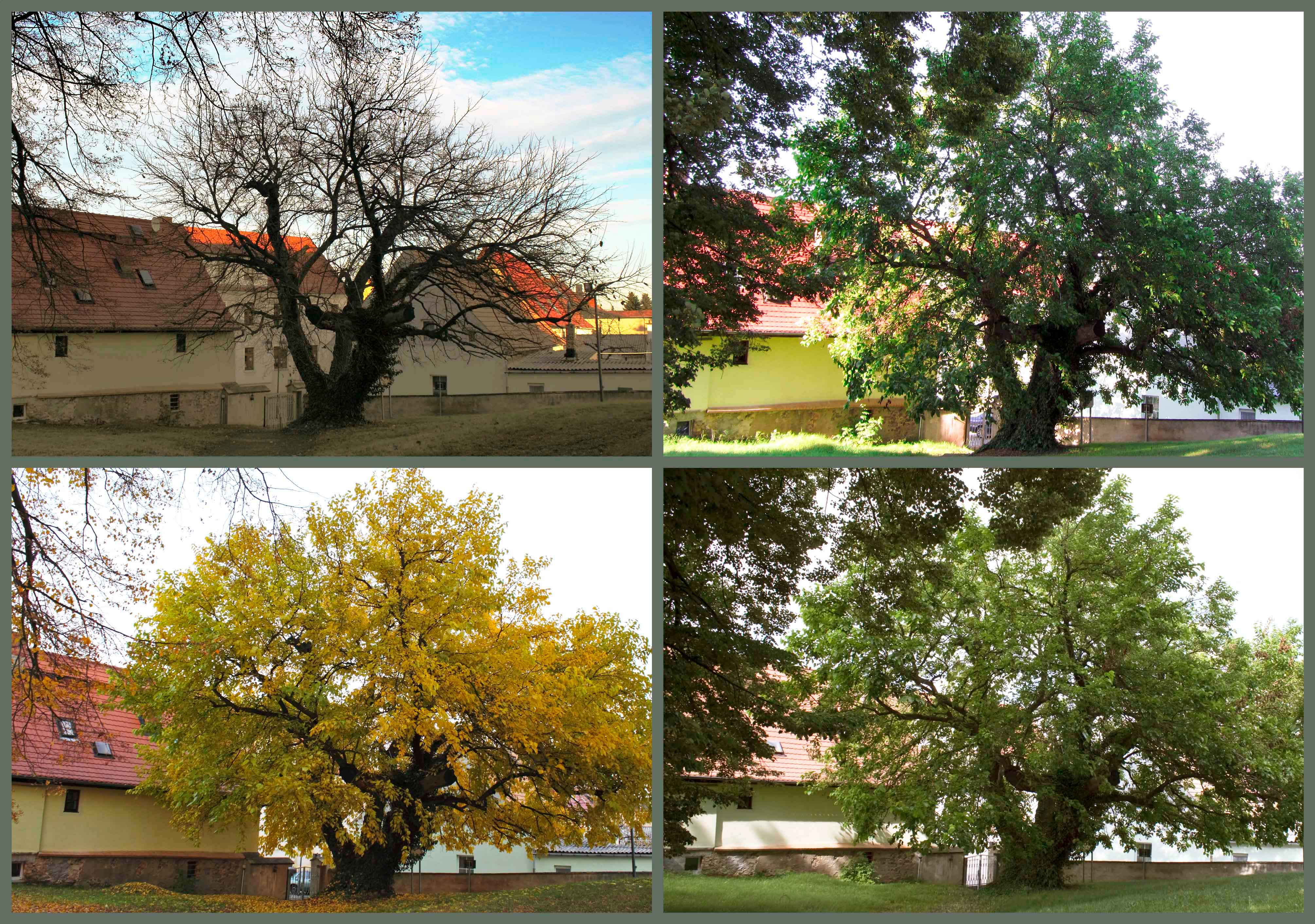 Der älteste Maulbeerbaum Deutschlands auf dem Kirchhof in Schildau. (Maulbeerbaum in den 4-Jahreszeiten)